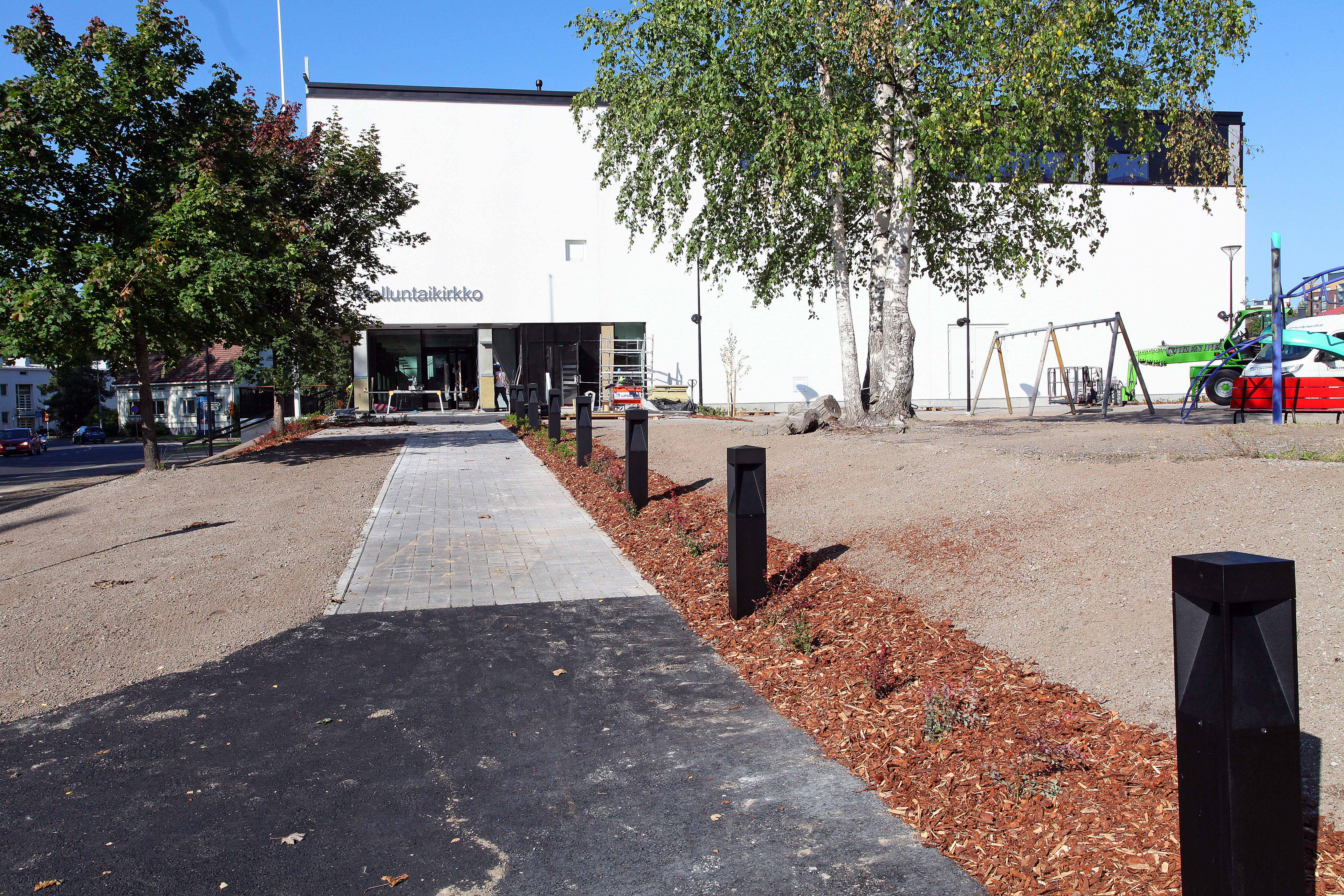 Helluntaikirkon pääsisäänkäynti